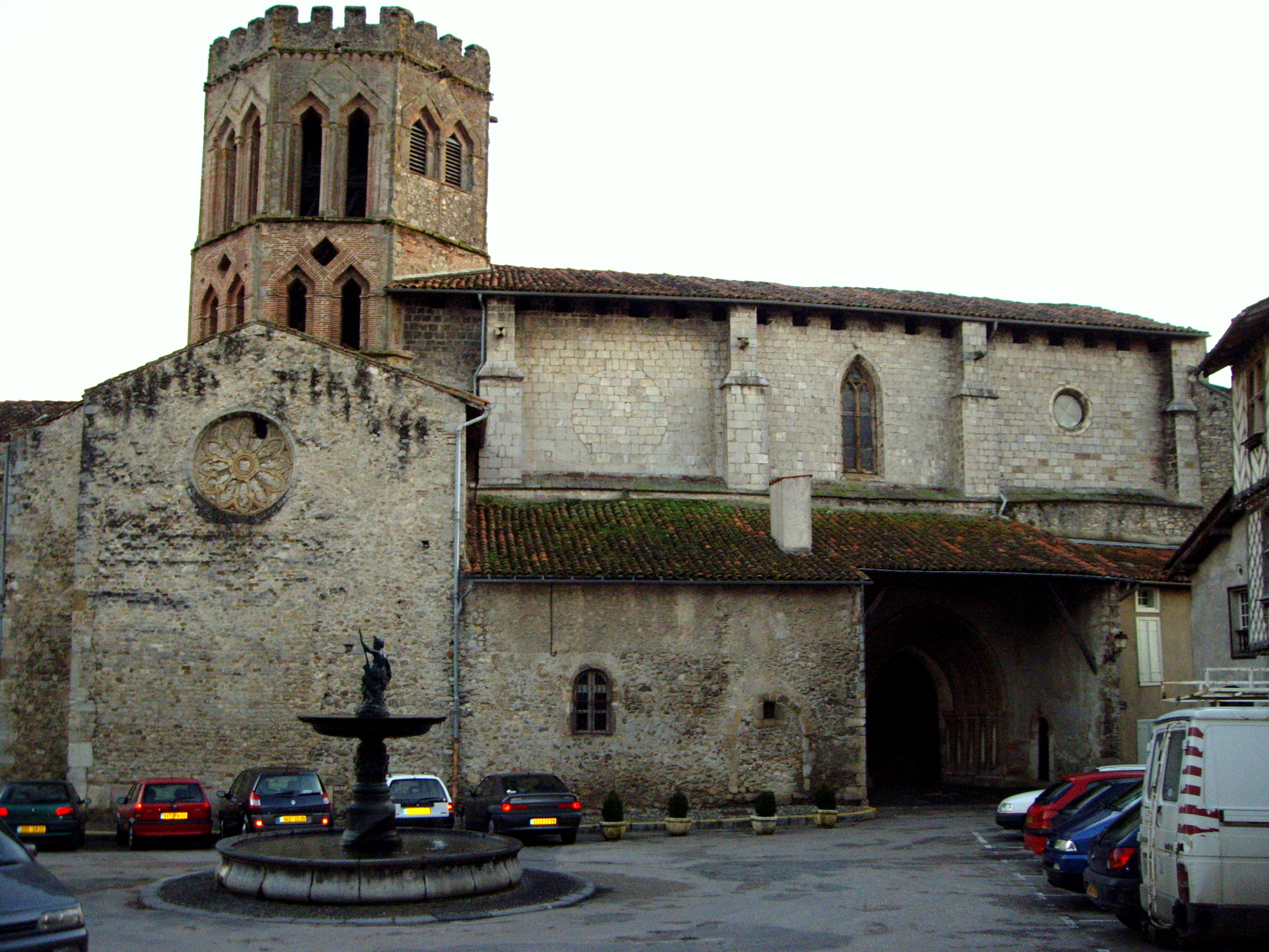 Cathédrale Saint-Lizier (Saint-Lizier, 09)